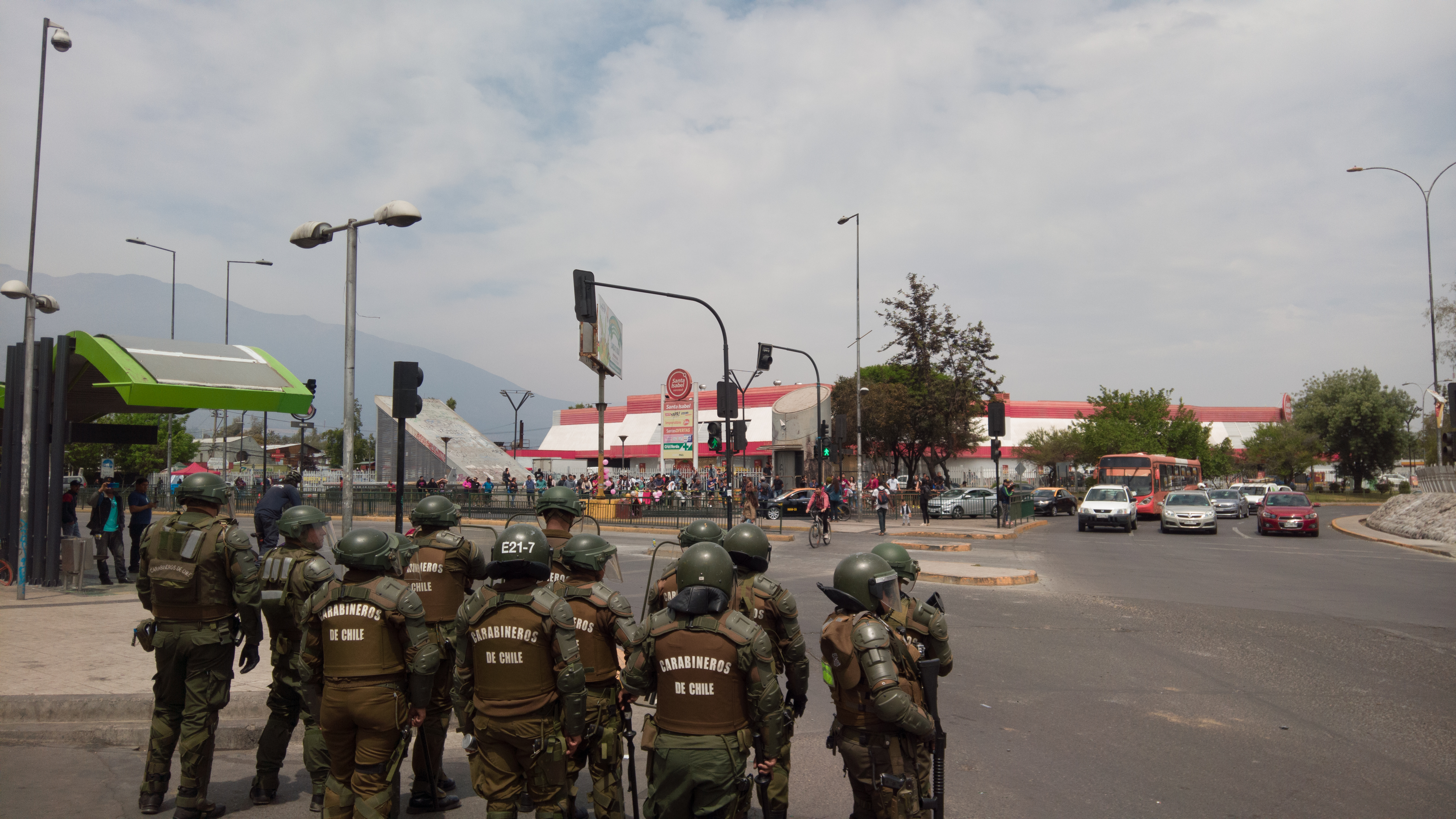 Fuerzas Especiales de Carabineros vigilando protesta en la rotonda Grecia (Santiago de Chile).